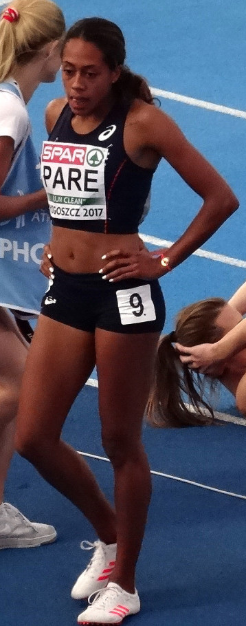 Młodzieżowe Mistrzostwa Europy w Lekkoatletyce U23 w Bydgoszczy 13-16 lipca 2017, finał biegu na 200 m kobiet